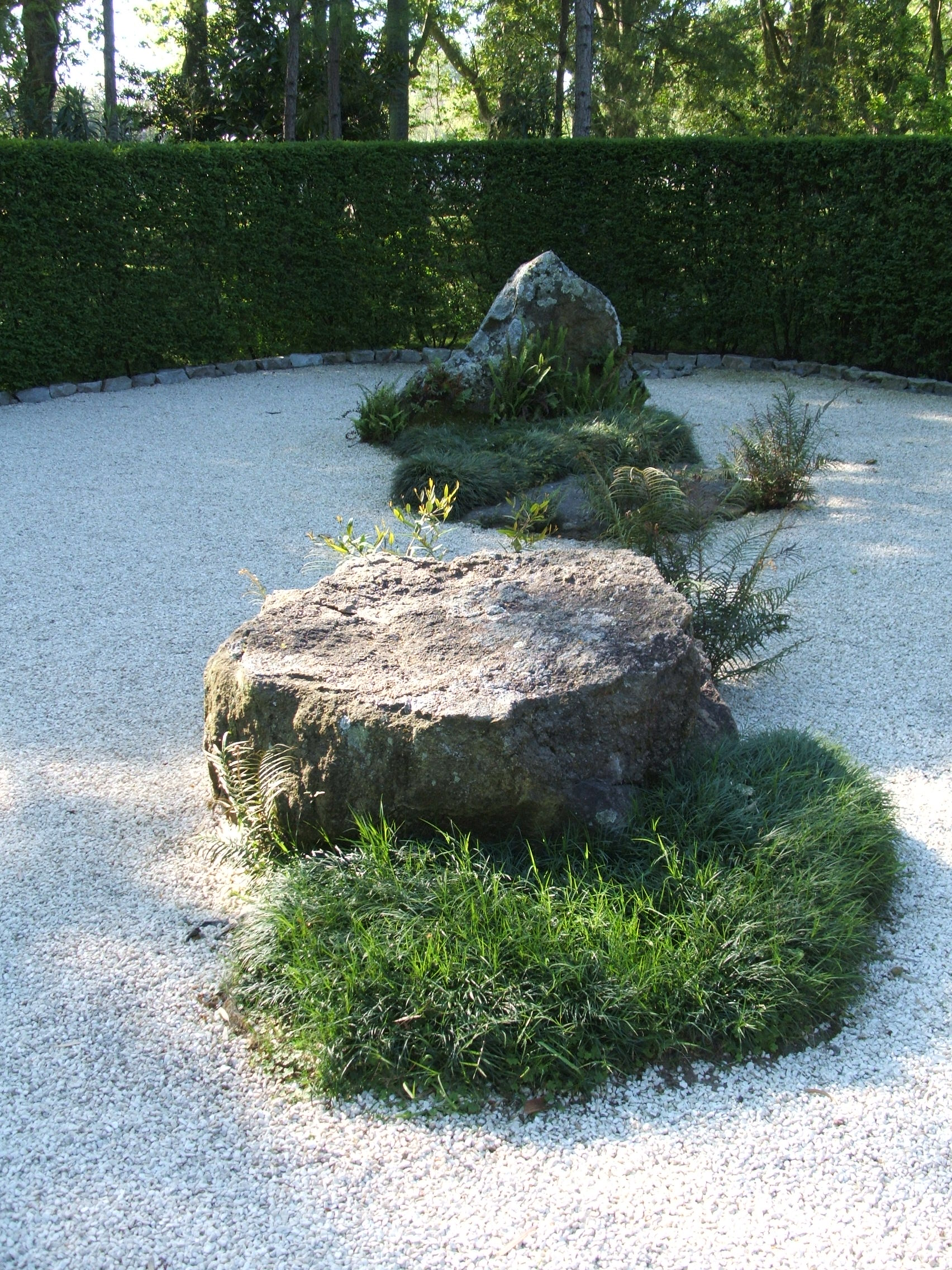 Jardín seco en el Jardín Japonés de Montevideo